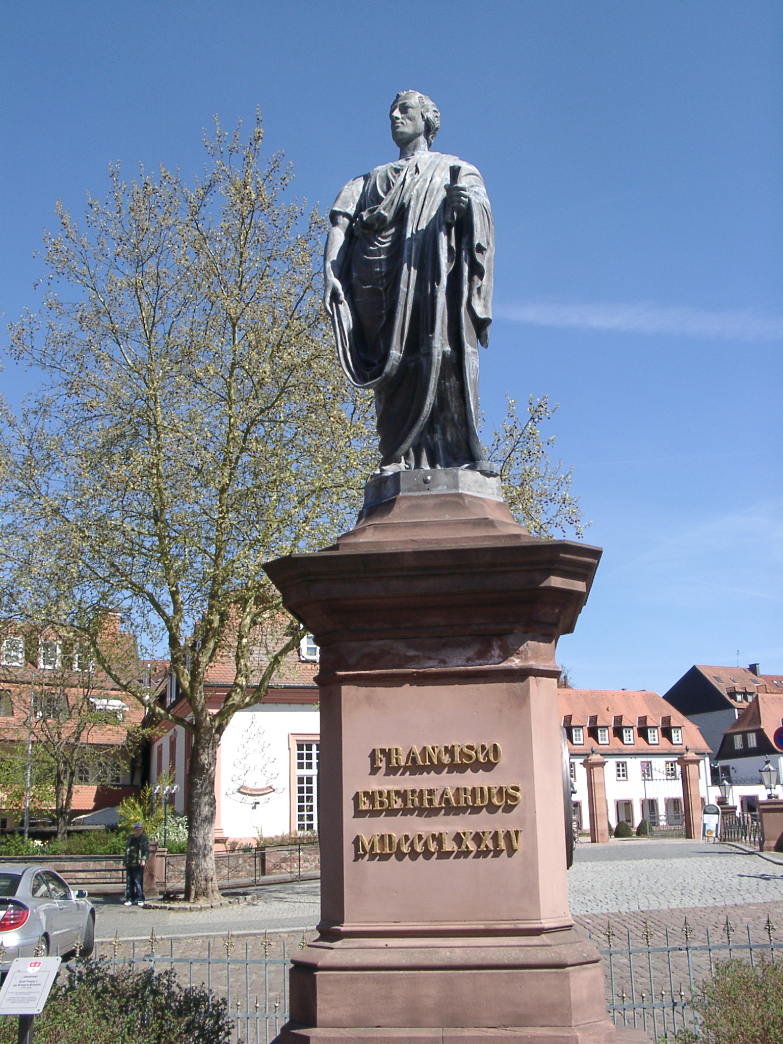 Erbach (Odenwald), Graf Franz von Erbach